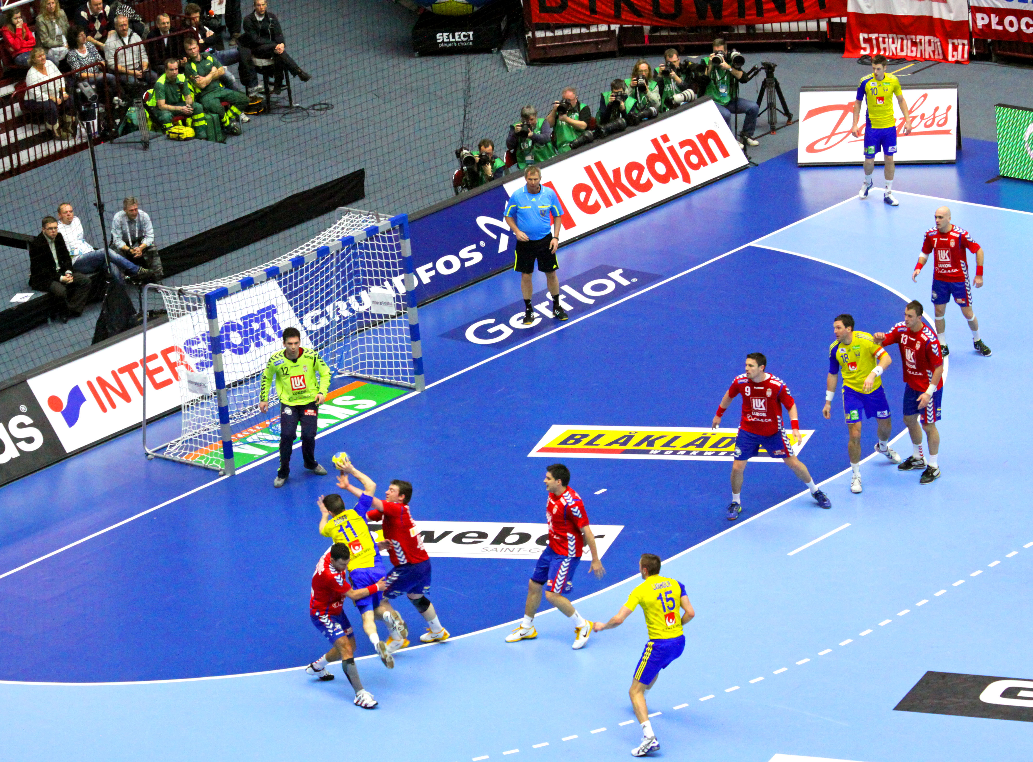 Malmö. Sverige-Serbien på Handbolls VM.